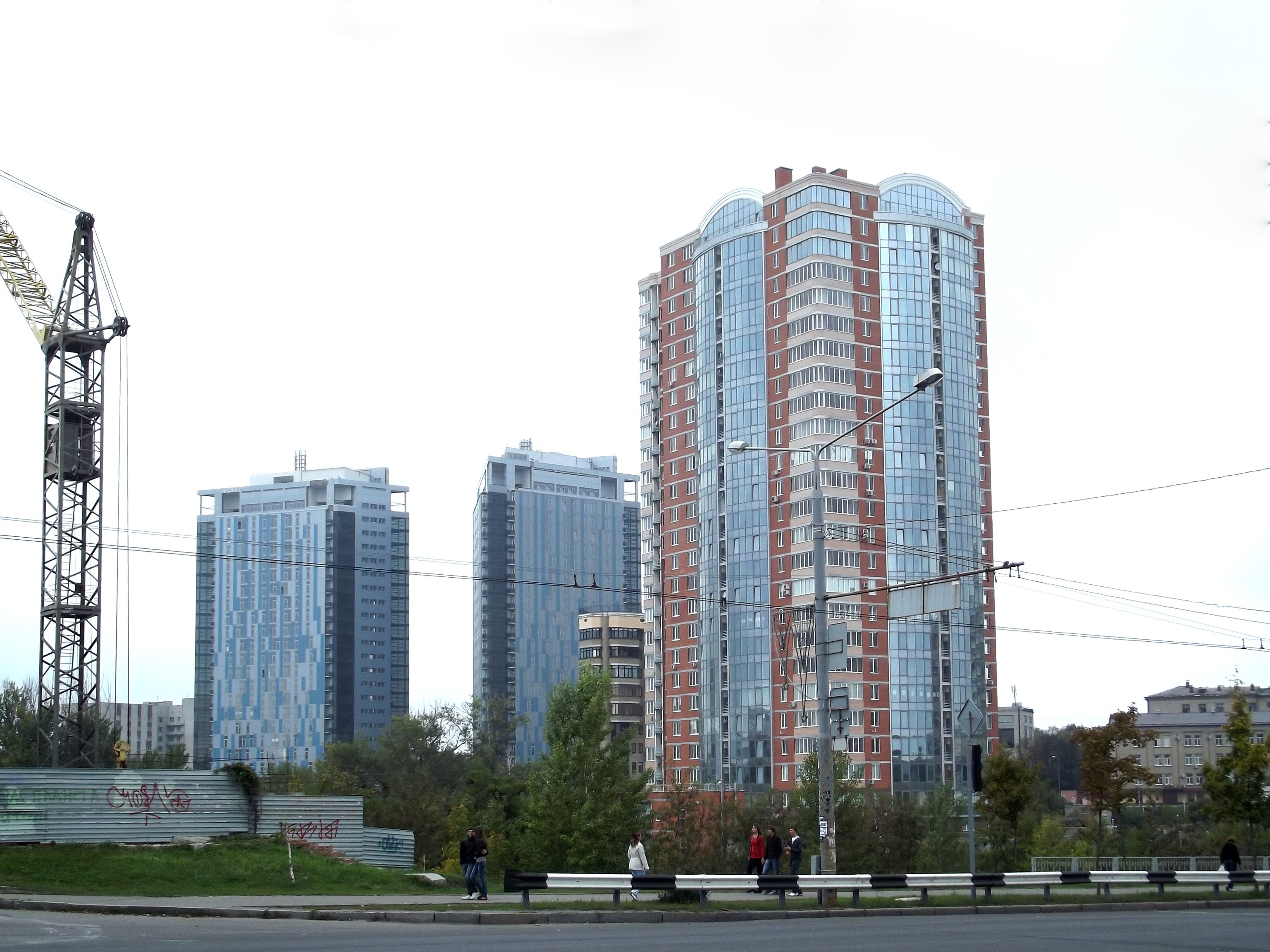 Харьков строится